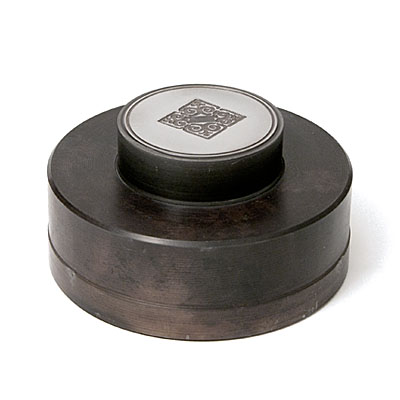 Pantográf maróval készült sajtolószerszám, gyűrűs éremveréshez